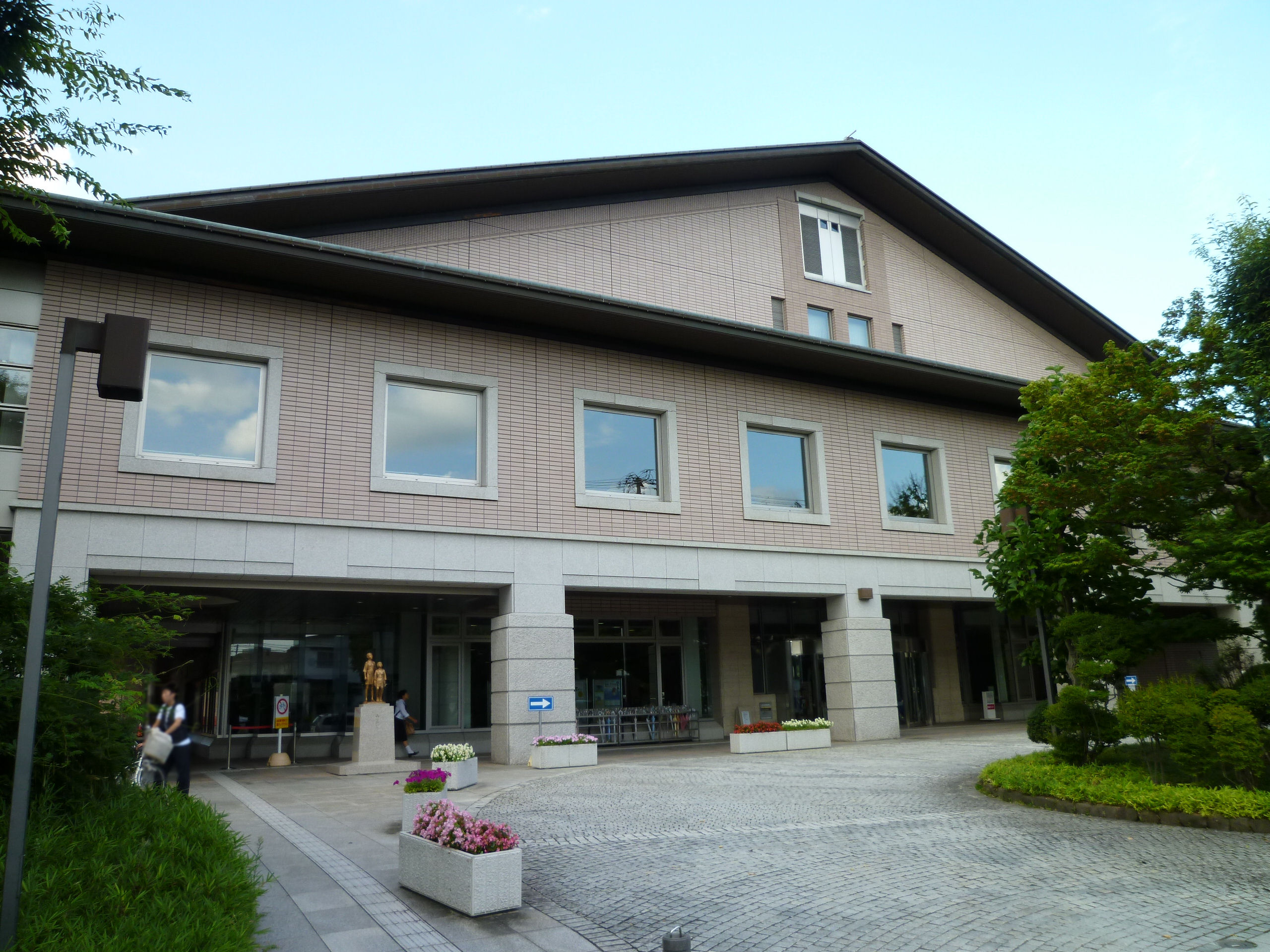 遊学館・山形県立図書館（山形市緑町）